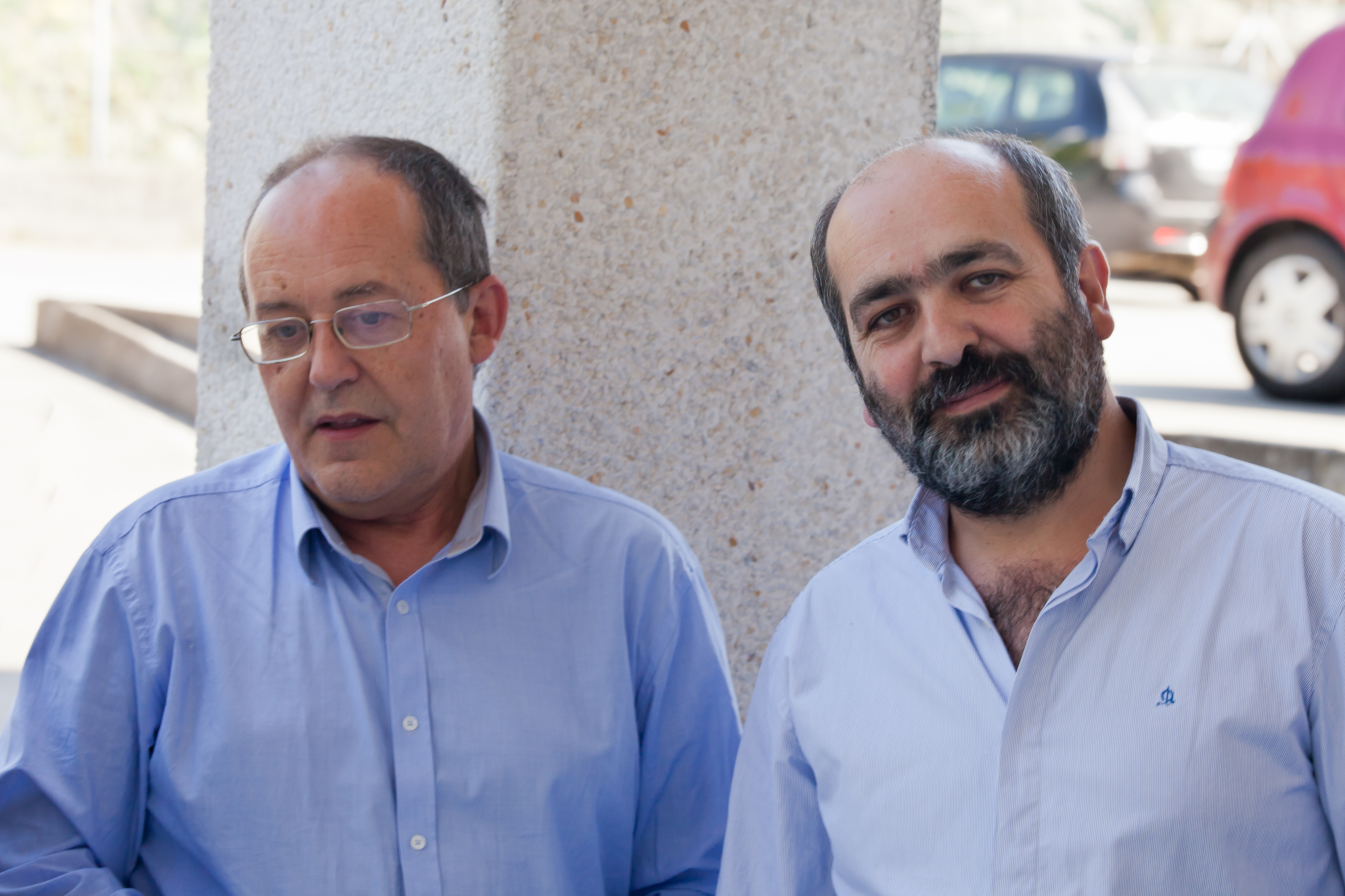 Manolo González, premio Leixaprén, e David Pérez Iglesias (de Soncine). Son de cine. Porto de Son, Galicia (Spain)